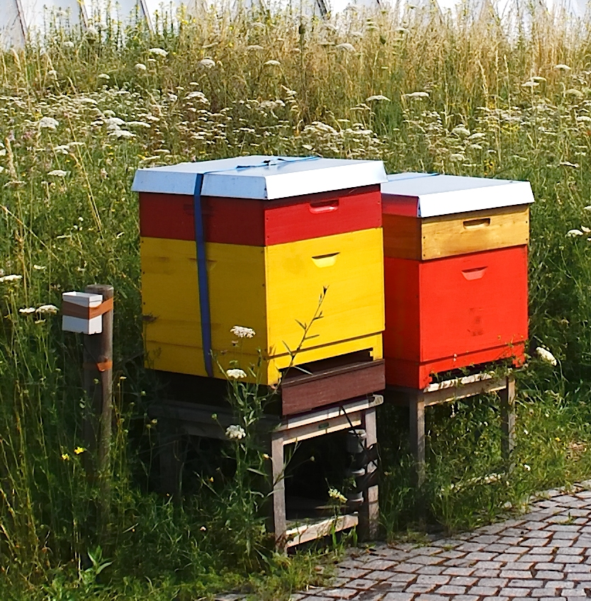 GSM-Modem (am Pfosten) und elektronische Stockwaage (unter dem linken Bienenstock), auf dem Dachgarten der Bundeskunsthalle in Bonn, Deutschland. Dort werden seit 2011 ein Dutzend Bienenvölker gehalten; im gleichen Jahr wurde einer der Bienenstöcke mit einer elektronischen Stockwaage ausgestattet. Die lokal gemessenen Daten zum Wetter und zur Zu- und Abnahme des Waagvolkes werden täglich automatisch per SMS an einen Server gesendet und auf einer öffentlichen Webseite den Imkern im Raum Bonn sowie sonst Interessierten zur Verfügung gestellt.